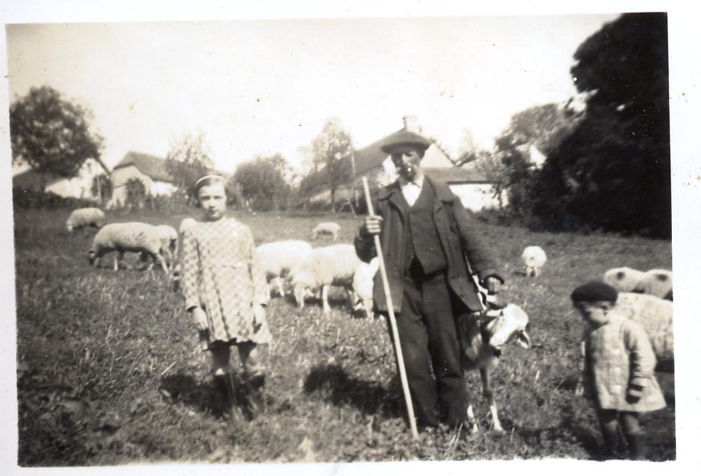 Photographie au can de Case prise par Victorine Darré vers 1936. Brebis de race Lourdaise et leur berger, François Dubarry dit Françoues de Coulat, oncle maternel de Victorine. Sont aussi présents, Maryse Darré fille de Victorine et Jeannot Abbadie dit Jeannnot de Coulat, petit fils de Françoues.